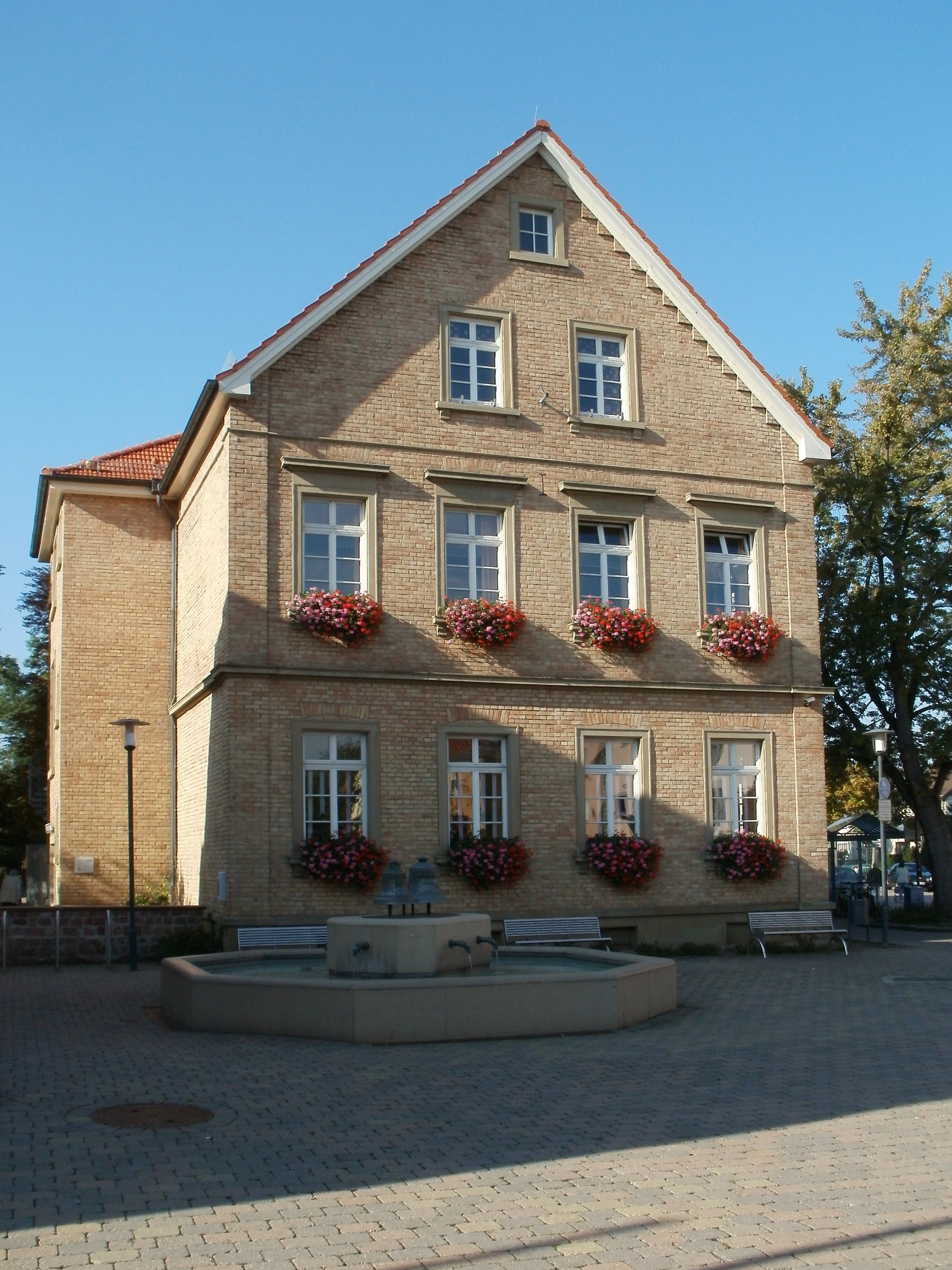 Alte Schule (Oftersheim)